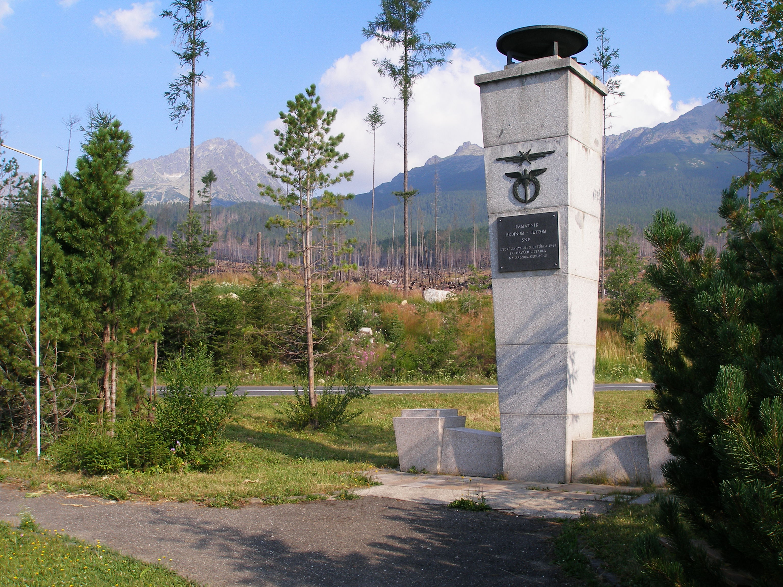 Vojnový pamätník vojakom, ktorí v októbri roku 1944 havarovali pri lete nad Gerlachom na pomoc Slovenskému národnému povstaniu (SNP). Tatranské Zruby,Vysoké Tatry, Slovakia. Pamätné tabule sú aj na Symbolickom cintoríne pri Popradskom plese. Padlí vojaci sú pochovaní na cintoríne v obci Gerlachov. Vľavo vzadu je Gerlachovský štít.